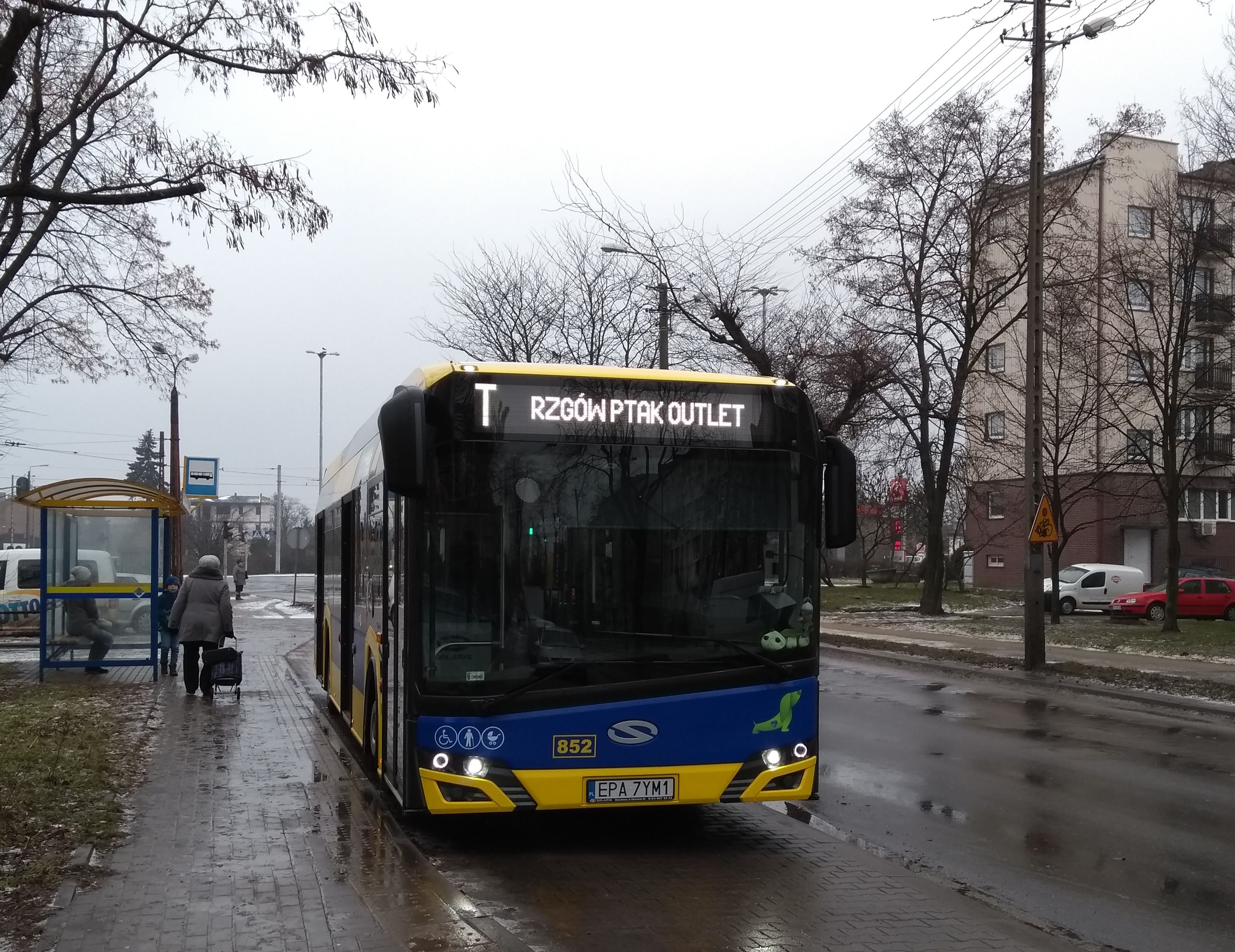 Hybryda obsługuje przystanek przy ulicy Wiejskiej jako linia T